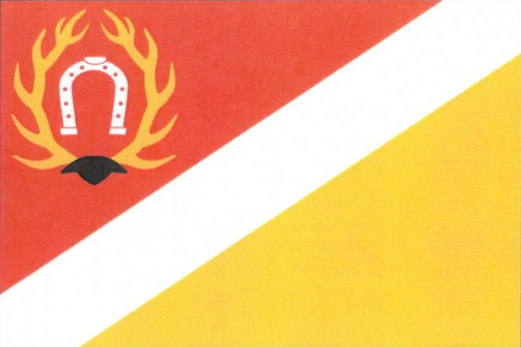 Vlajka obce Libáň